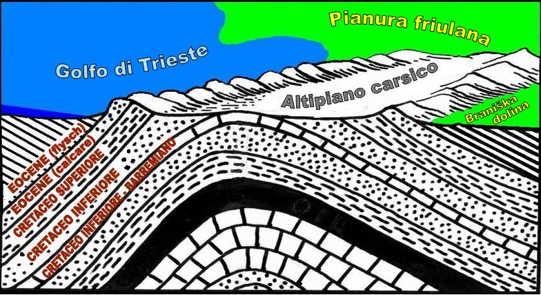 Immagine ottenuta da elaborazione del File:Anticline (PSF).png caricato su Wikimedia Commonsa da Anonymus 101 il 18 Luglio 2008, utilizzato in " ed implementato da contenuti presenti su carta geologica semplificata del carso classico elaborata da Fulvio Tomsich ed esposta al Giardino Botanico di Trieste La carta rappresenta in modo schematico ed approssimativo la disposizione dei diversi strati rocciosi che compongono il sottosuolo dell'Altipiano carsico ed indica il periodo geologico della loro formazione